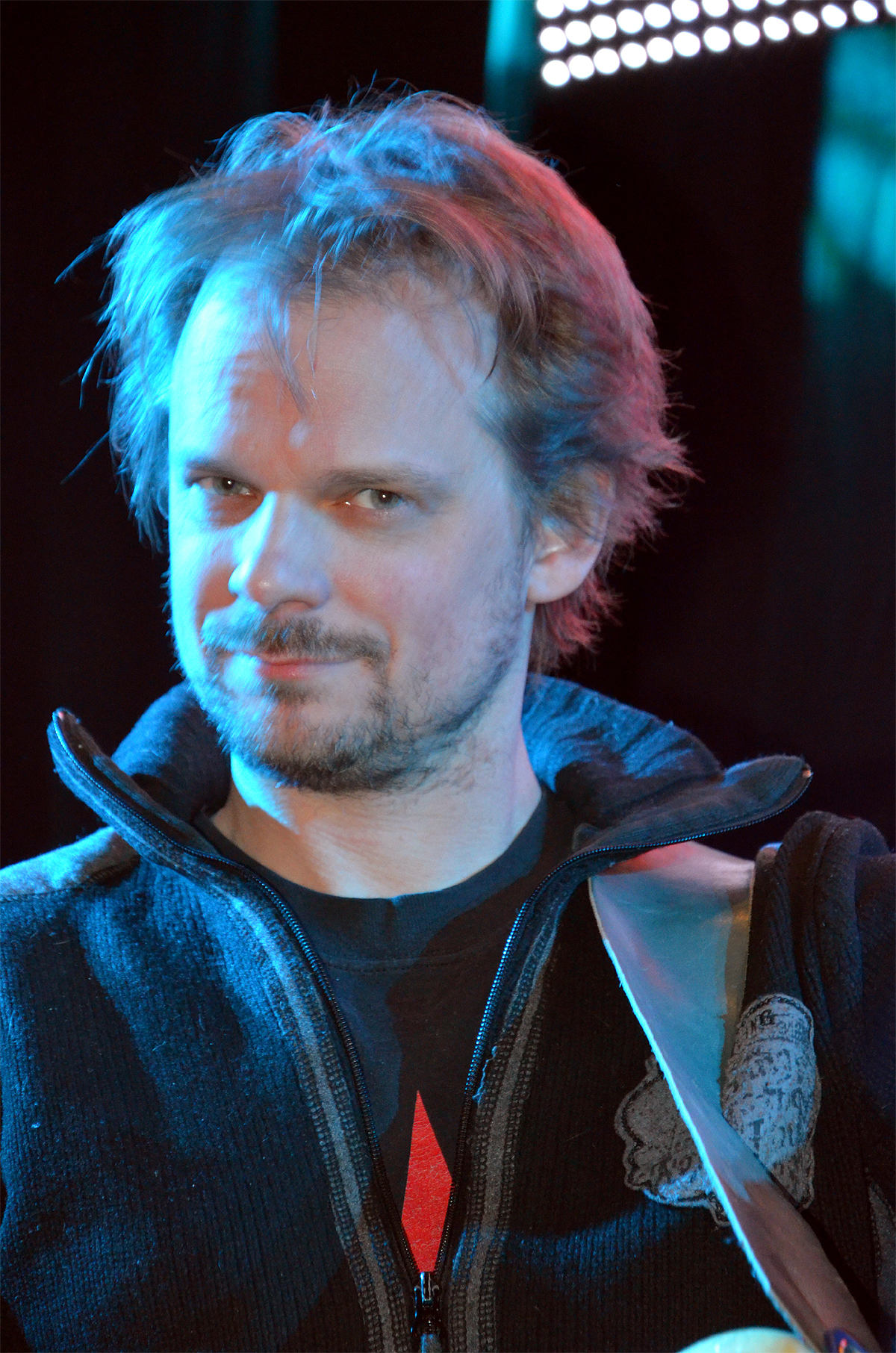 Gemeinsam mit anderen Mitgliedern der 2008 aufgelösten Rockband Fury in the Slaughterhouse sowie mit der "One-Man-Band" Kuersche spielte auch der Musiker Christian Decker, wie alle Künstler, ehrenamtlich vor den Gästen des Festes Die!!! Weihnachtsfeier für Obdachlose und Bedürftige in Hannover ...